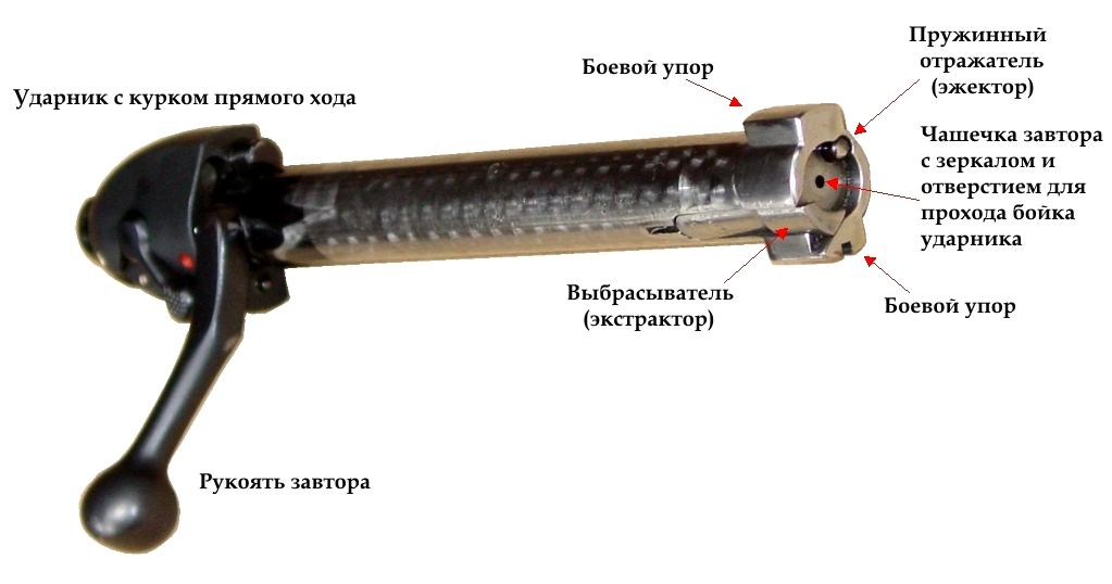 Zylinderverschluss eines Repetiergewehrs mit Bezeichnungen Grafik Joachim Bäcker 2005/09/27